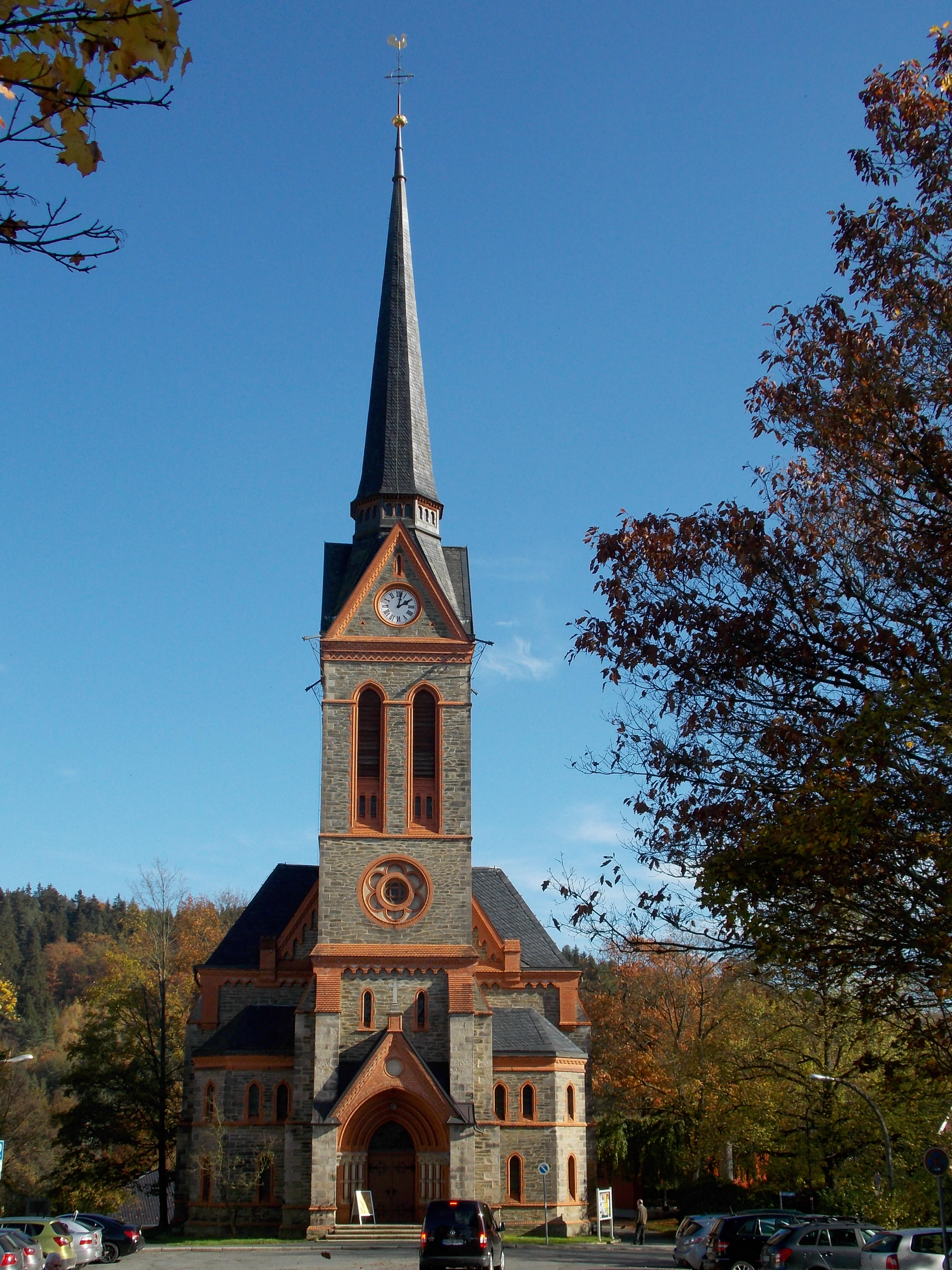 Bad Elster, St.Trinitatiskirche, Außenansicht von Westen